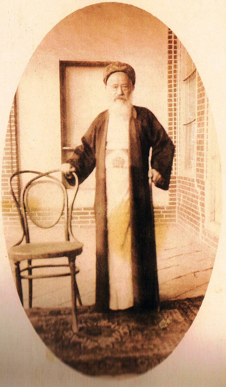 Yosef Hayim sharim